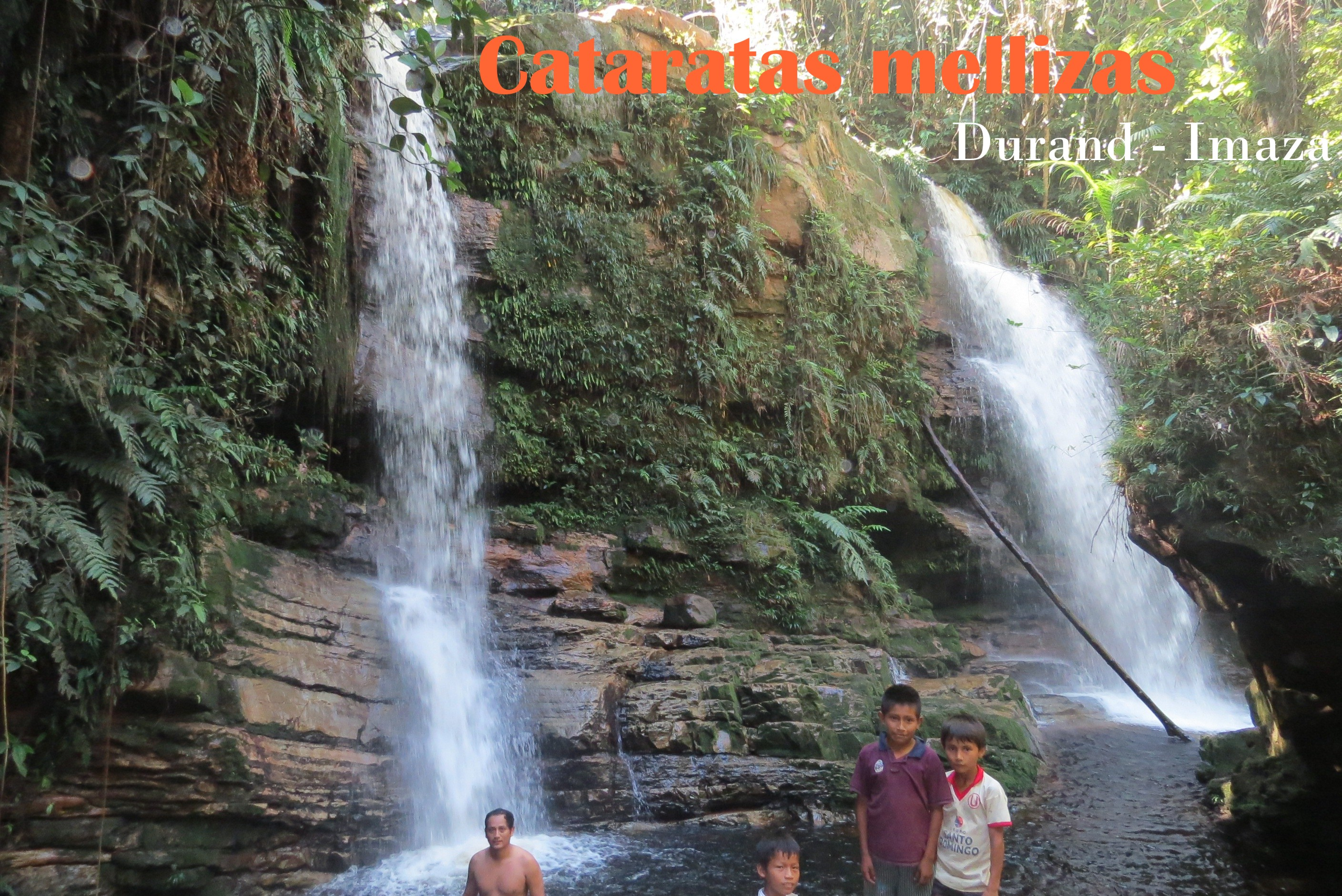 Cataratas de la amazonia